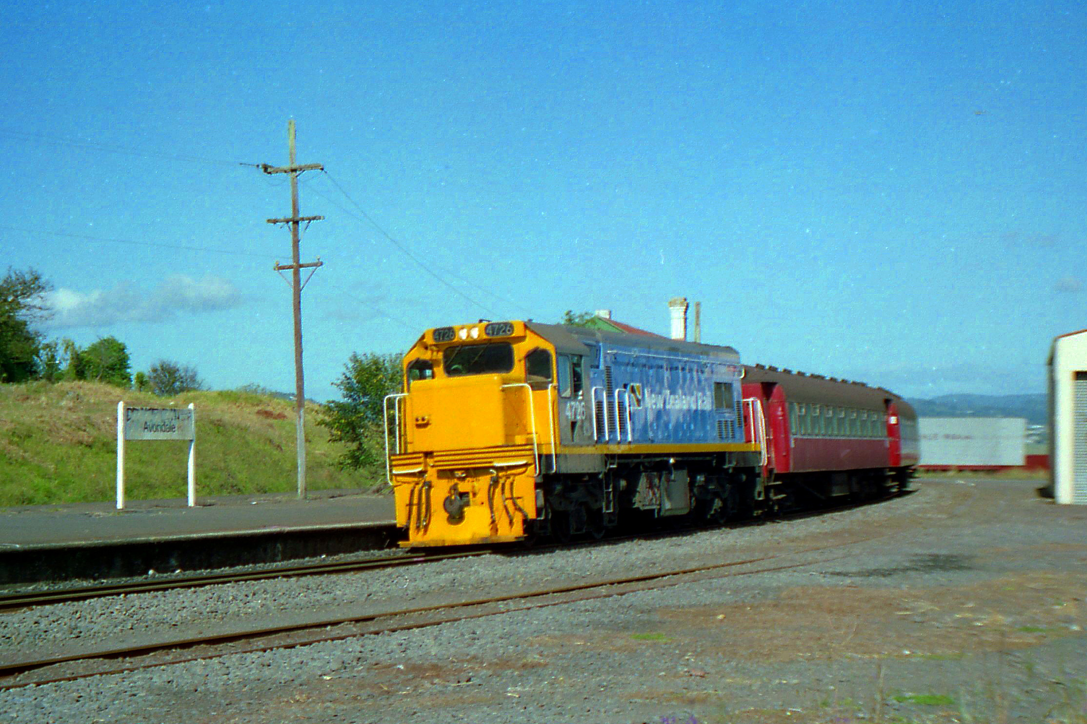 Avondale,Auckland.New Zealand